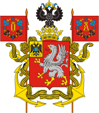 Герб Севастополя 1893 года